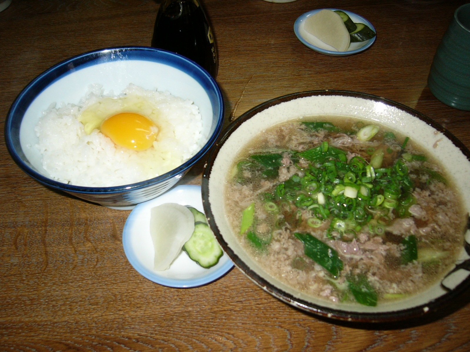 「千とせ」の「肉吸い」と「小玉（玉子ご飯の小」